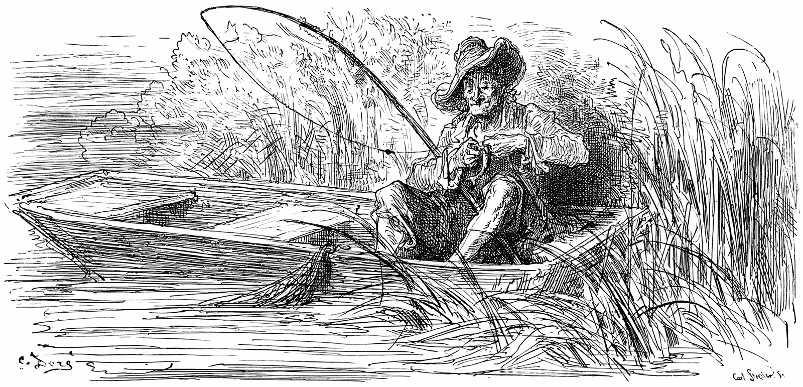 grafika z książki PL Bajki, Jean de La Fontaine, nakładem i drukiem Jana Noskowskiego, Warszawa 1876